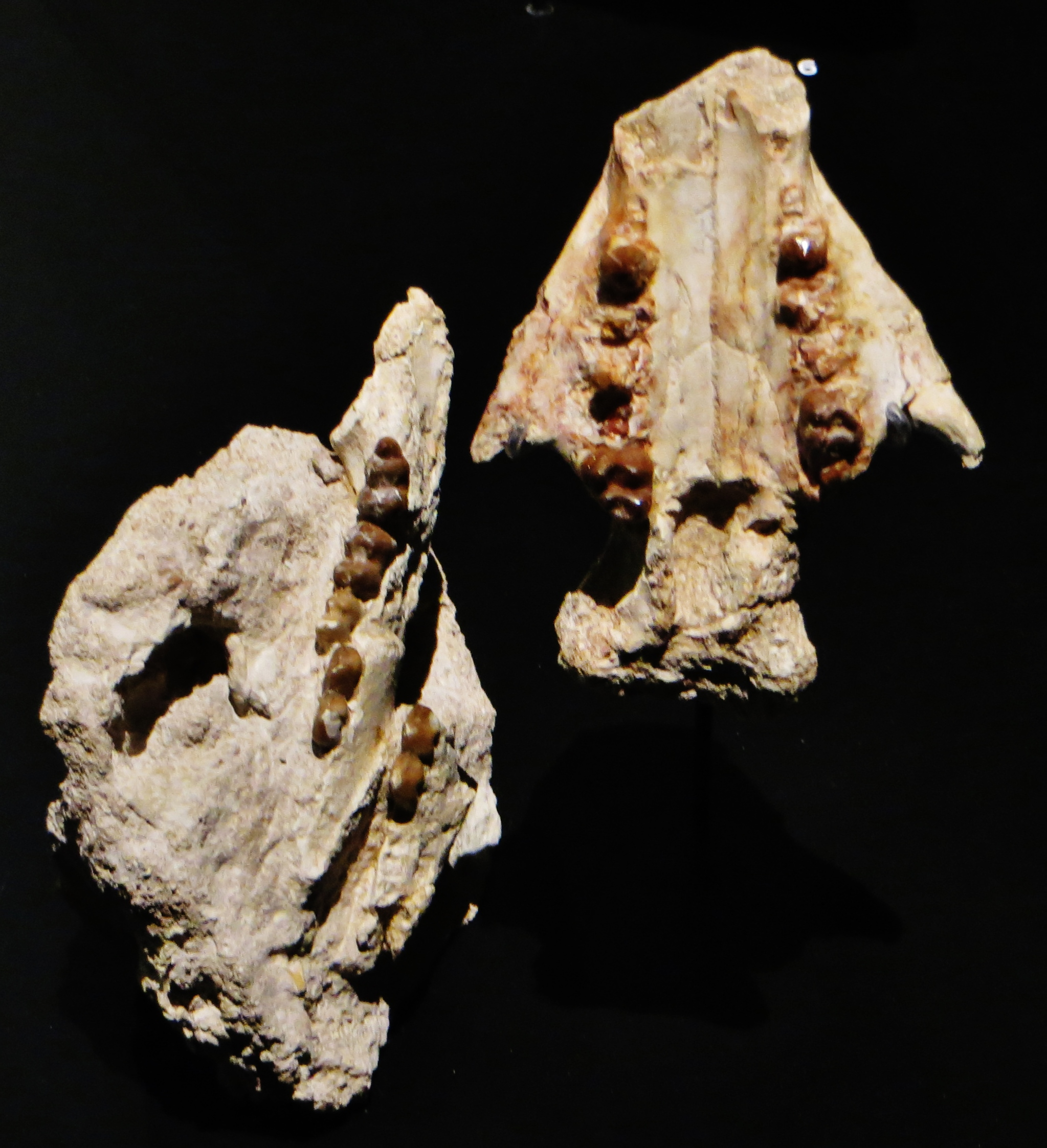 Fossil - Took the picture at Musee des Confluences, Lyon